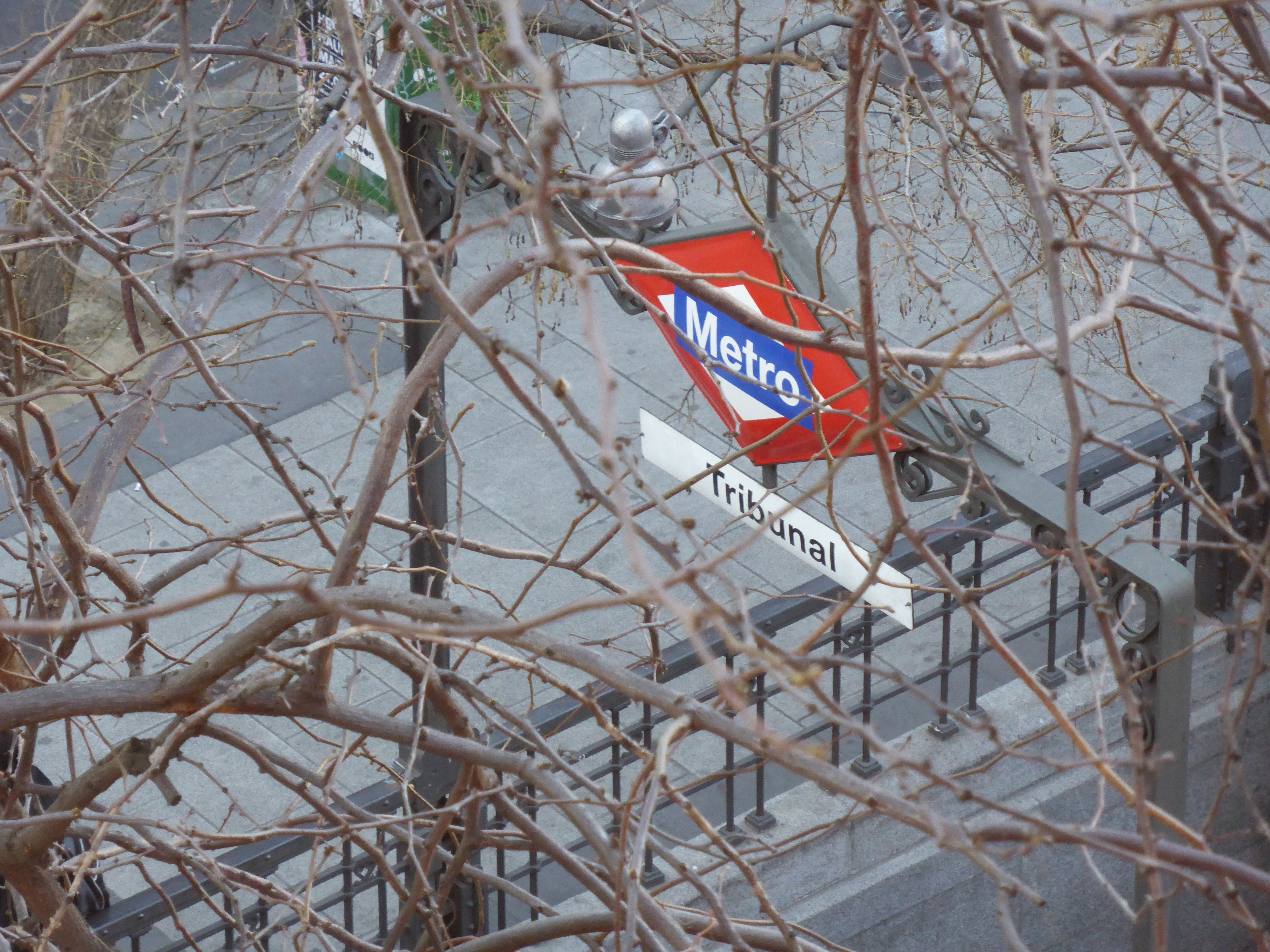 Fotografía tomada desde una ventana del Museo Municipal (o Museo de Historia de Madrid). Boca de acceso al Metro "Tribunal", de la línea 1 de "Metro de Madrid" (ferrocarril metropolitano de Madrid, España).